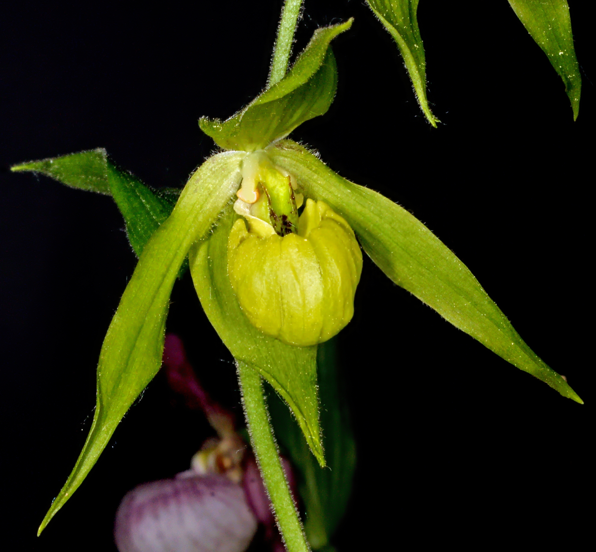 Cypripedium henryi